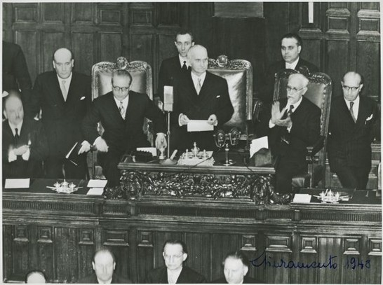 Il capo dello Stato Luigi Einaudi tiene un discorso dopo il giuramento; accanto a lui ci sono Gronchi e Bonomi che applaude; tra i presenti si riconoscono Mattarella e Scoccimarro; De Gasperi e Pacciardi sono nei sottostanti banchi del governo